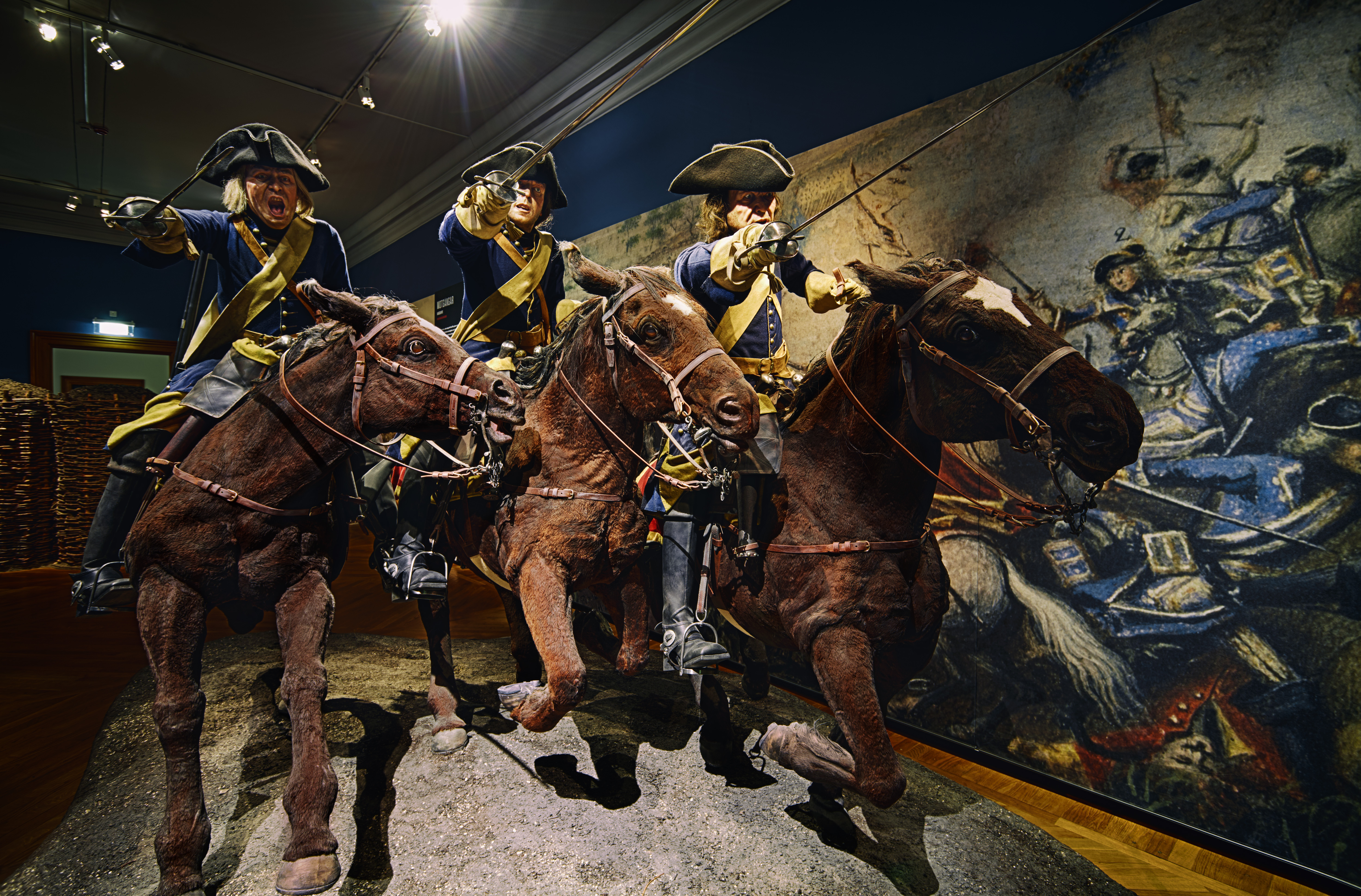 Karoliner